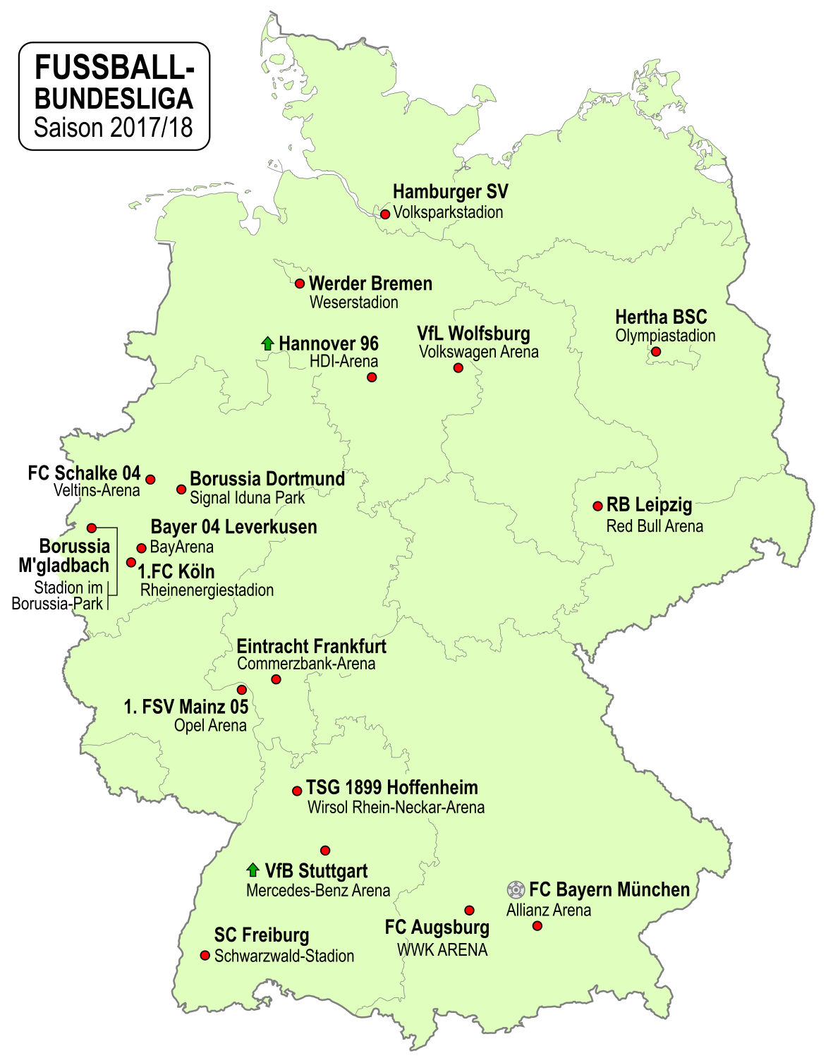 Karte der Vereine der Fußball-Bundesliga-Saison 2017/2018